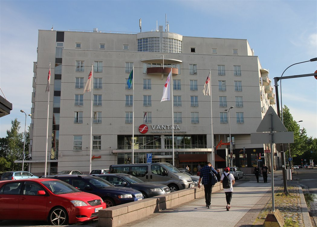 Hotelli Vantaan pääsisäänkäynnin puoli. Tämä Vantaan Tikkurilassa, Tikkurilan rautatieaseman läheisyydessä sijaitseva suuri hotelli on viralliselta nimeltään Original Sokos Hotel Vantaa. Hotelli tunnetaan muun muassa ravintola Tulisuudelmasta.